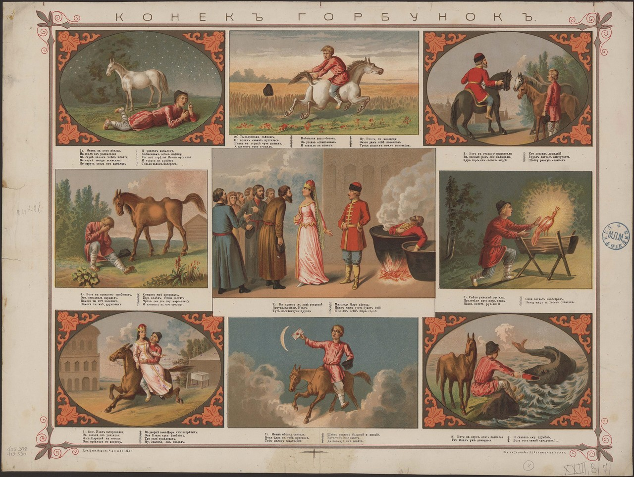 Конек горбунок. Москва. Хромолитография А.А. Абрамова. 1885 г.